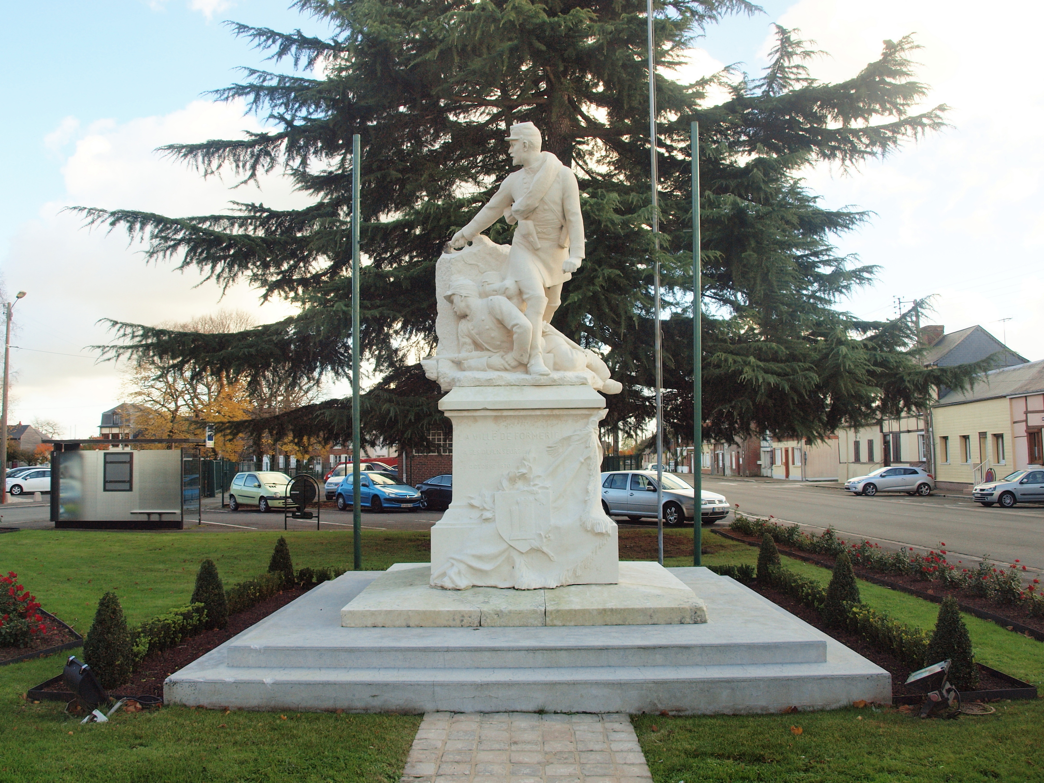 Formerie (Oise, France)